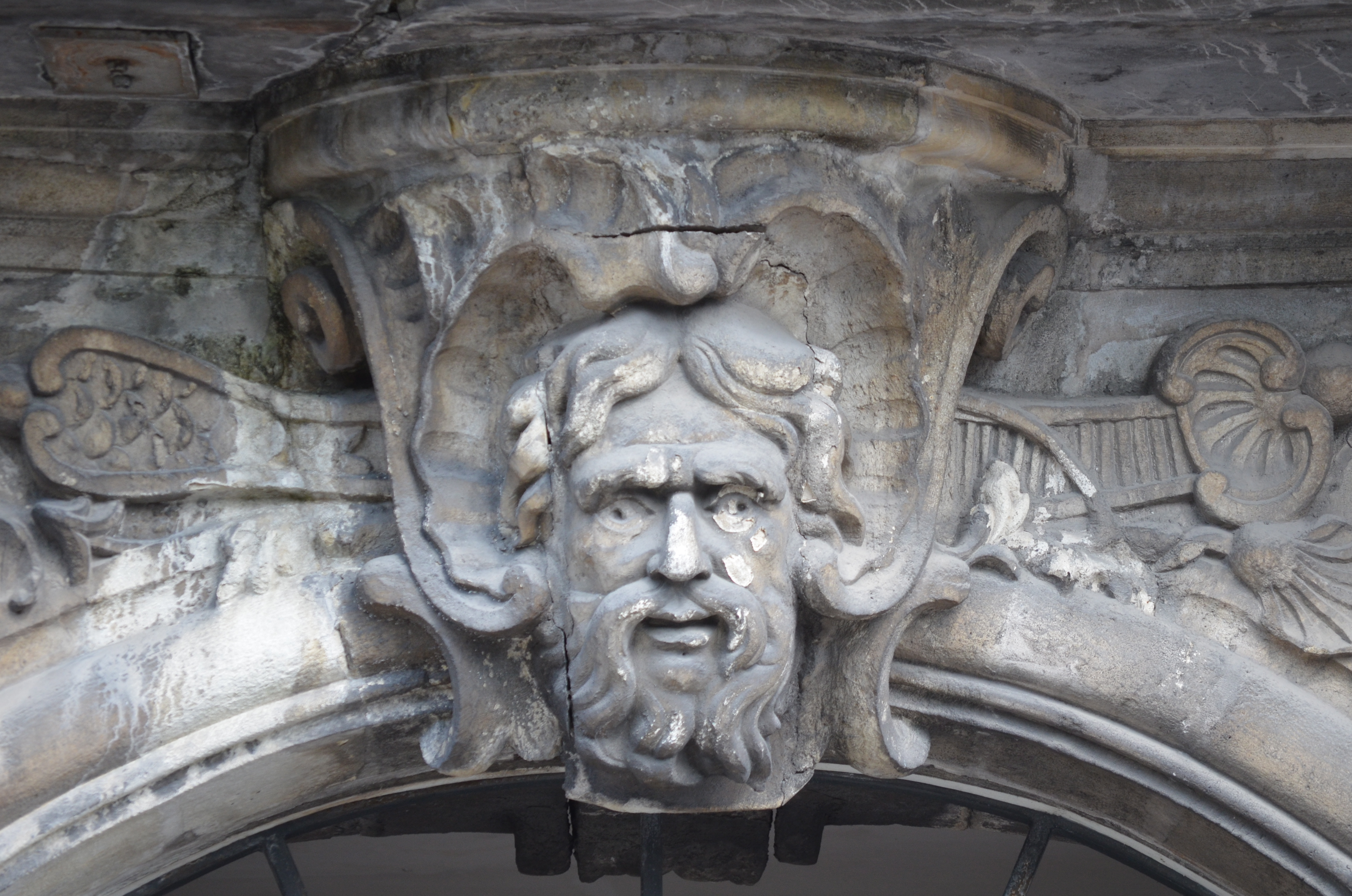 Mascaron de la façade principale de l'hôtel Villetreux situé au 3 place de la Petite-Hollande, façades latérales sur la rue Kervégan et le quai Turenne - Nantes. .